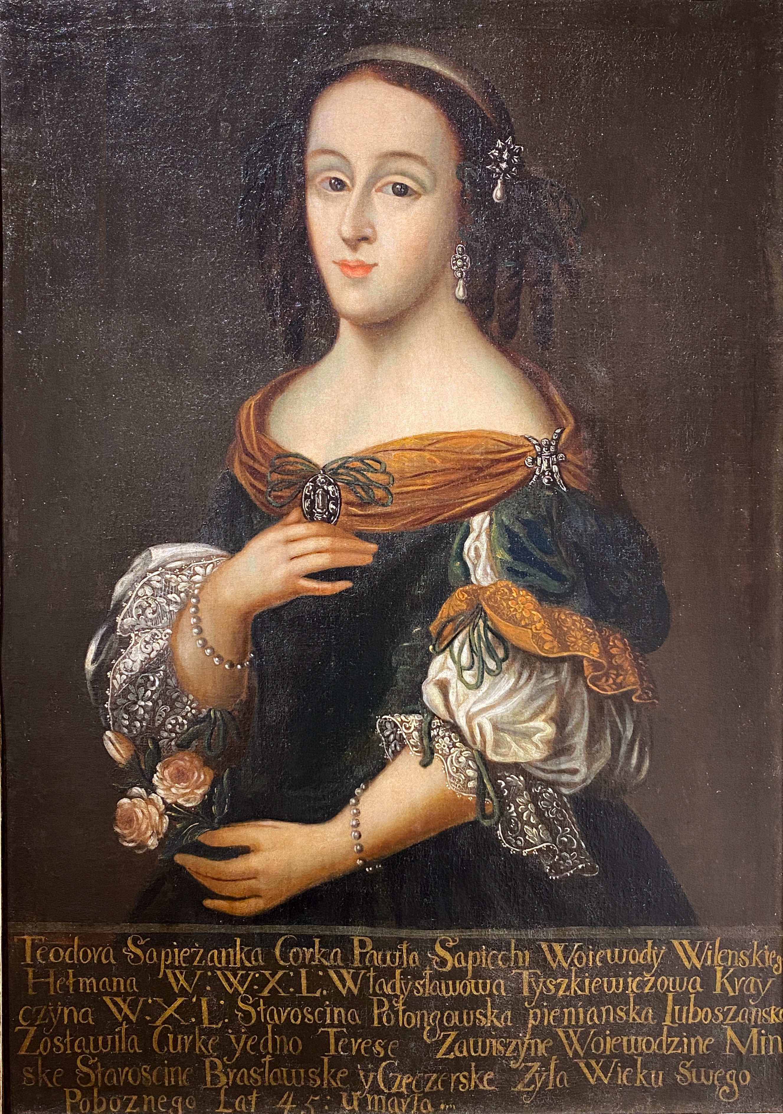 Беларуская (тарашкевіца): Партрэт Тэадоры Тышкевіч (Teadora Tyškievič) з Сапегаў (Sapieha)